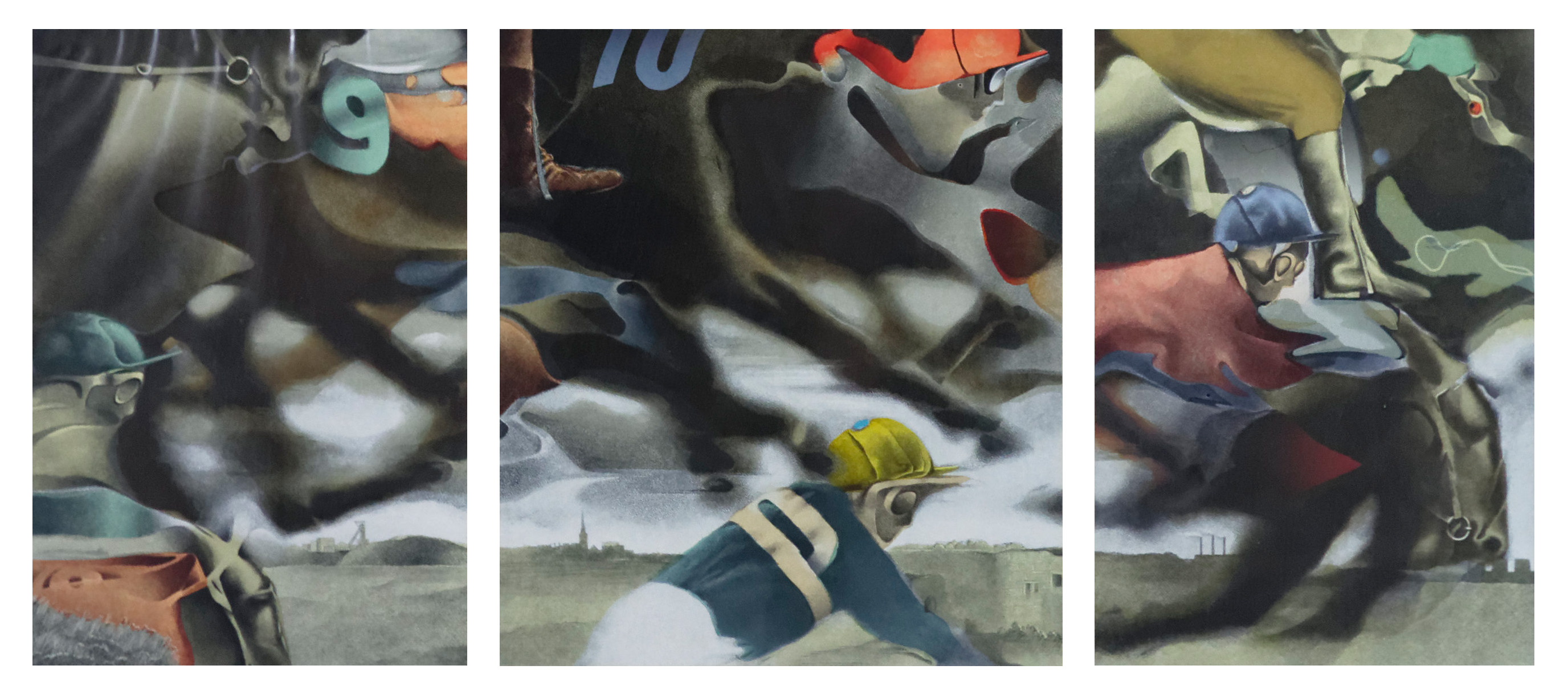 ARAL-Pokal, Öl auf Karton, 1972 (270 × 150 cm). Bemerkung des Künstlers: „Ich wuchs als Kind im Gelsenkirchener Stadtteil Horst-Emscher auf und ging dort auch zur Schule. Wie alle anderen Jugendlichen interessierten mich Rennbahn und Pferderennen. Die Erinnerung an die vorbeirasenden Pferde mit den bunten Jockeys hat sich mir tief eingeprägt. So lange Jahre habe ich diese Eindrücke mit mir herumgetragen, dass ich die Motive noch im vorgerückten Alter in Bilder bannte. In meiner kindlichen Perspektive hatte ich den Eindruck gewonnen, als hätten sich stampfende Pferdehufe mit den Rädern eines Eisenbahnzuges verschwistert. Ich wohnte neben einer Eisenbahnstrecke. Ich würde die darstellerische Methode von Aral-Pokal einen versetzten Realismus nennen. Die durchgehende Linie im Hintergrund ist durch eine Bergwerksanlage (links) gekennzeichnet, durch die Kirche und Schule von Horst Emscher, durch die Ruinen von Schloss Horst und rechts die Gelsenberg AG.“ (Aral)